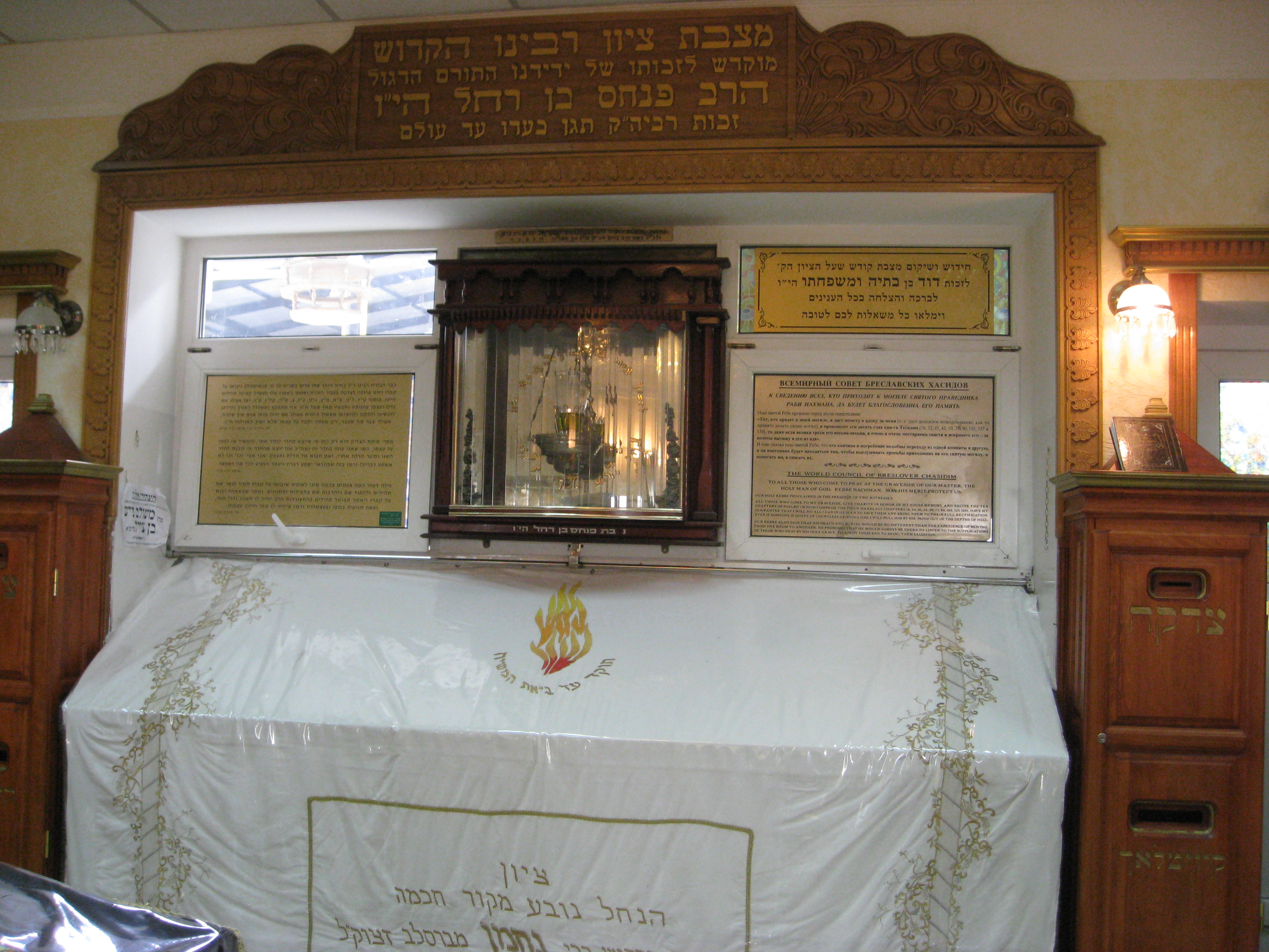 Rabbi Nahman Tomb (Uman, Ukraine)